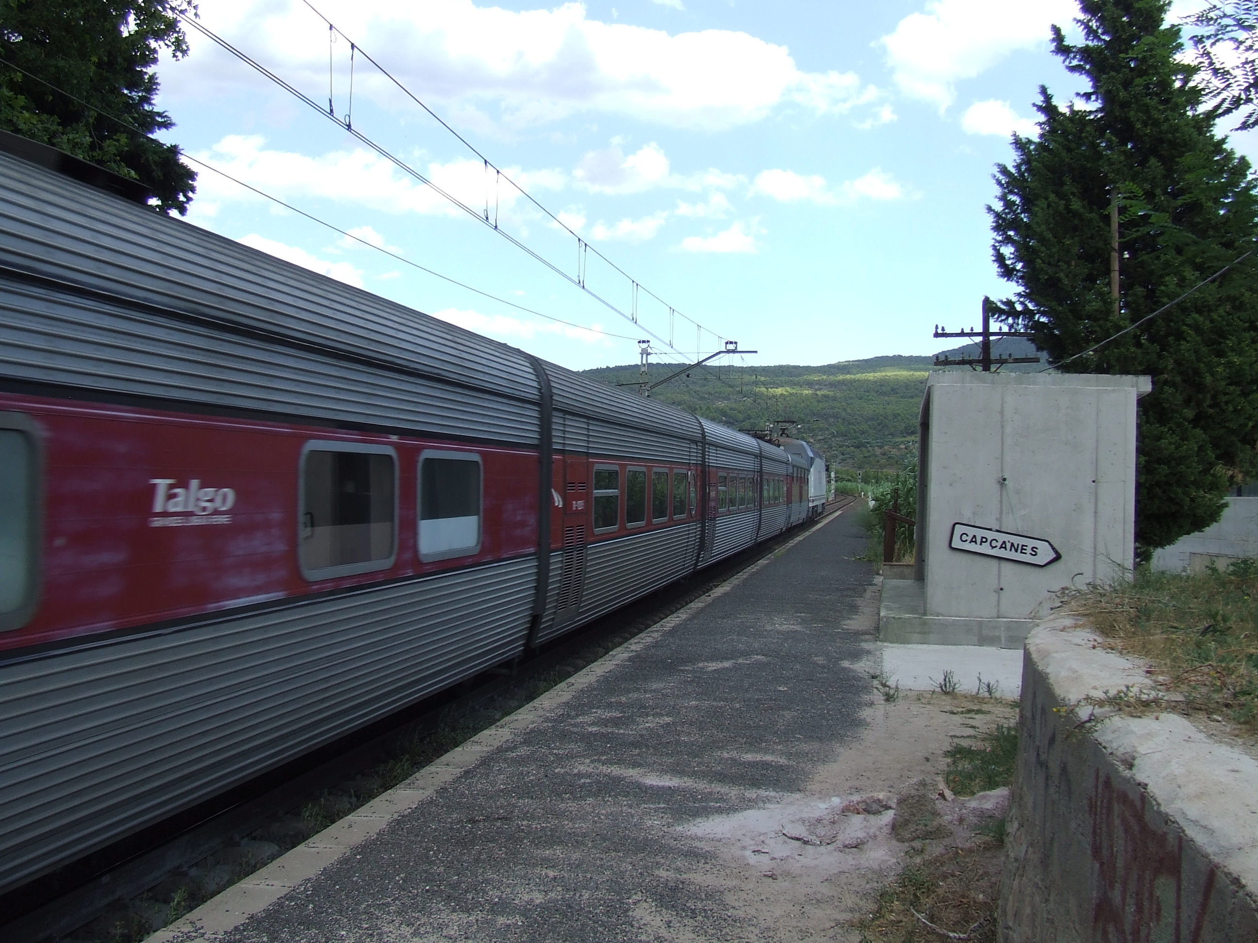 Estació de ferrocarril de Capçanes (el Priorat)